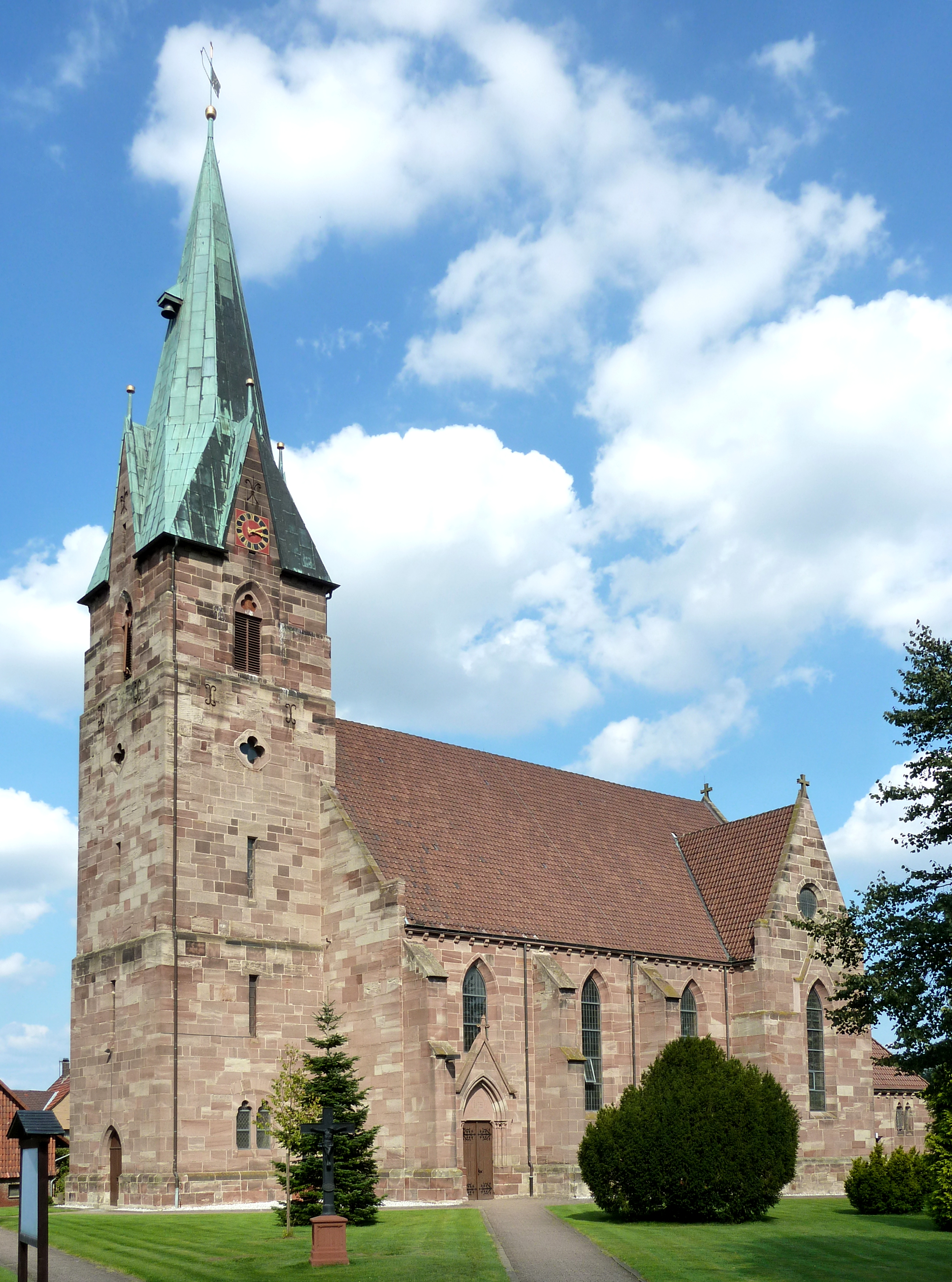 Katholische Kirche St. Andreas in Rüdershausen, Niedersachsen. Erbaut 1867-69 durch W. Tochtermann anstelle eines spätbarocken Vorgängerbaus